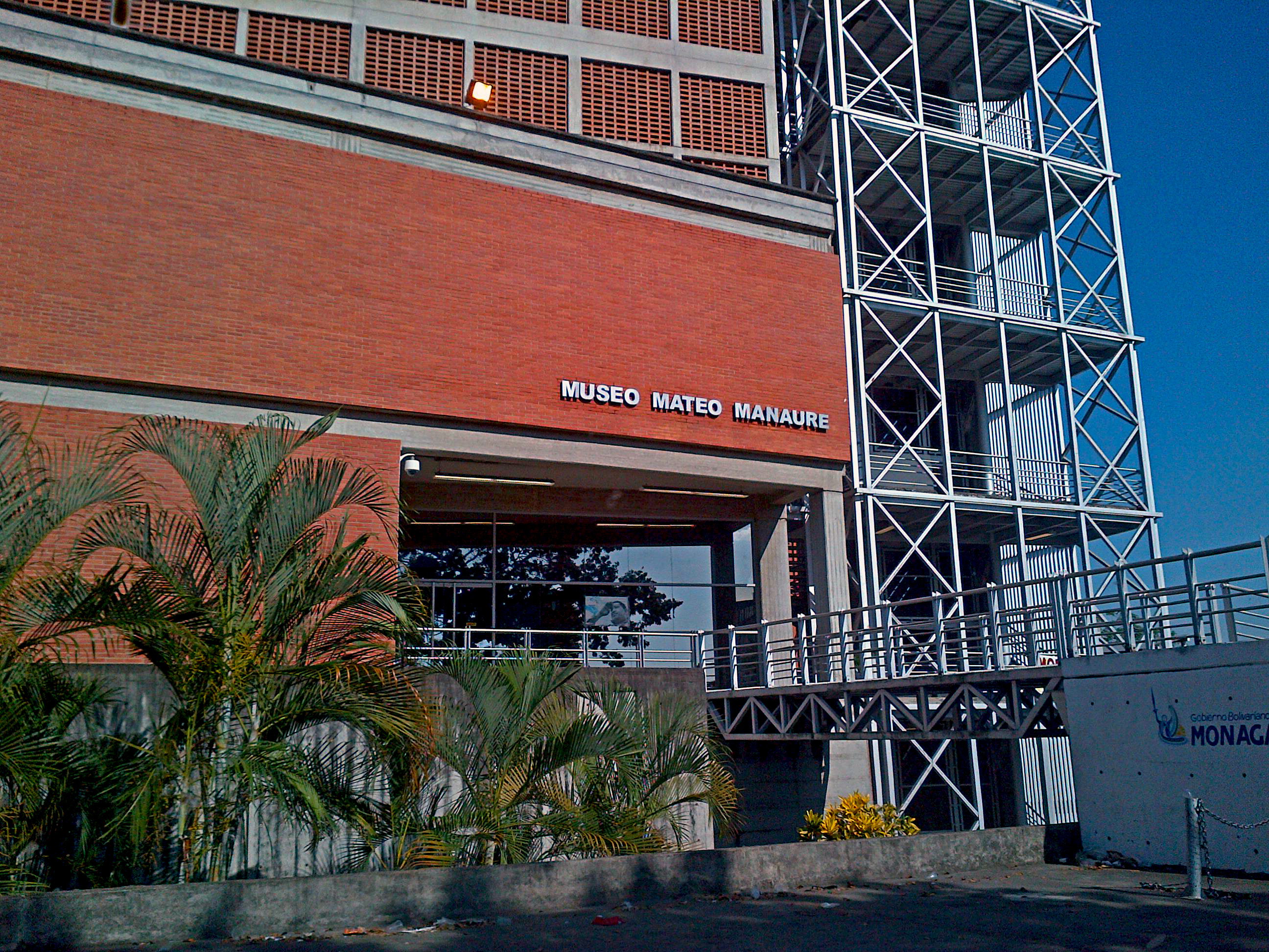 Museo Mateo Manaure de Maturín, Estado Monagas, Venezuela.